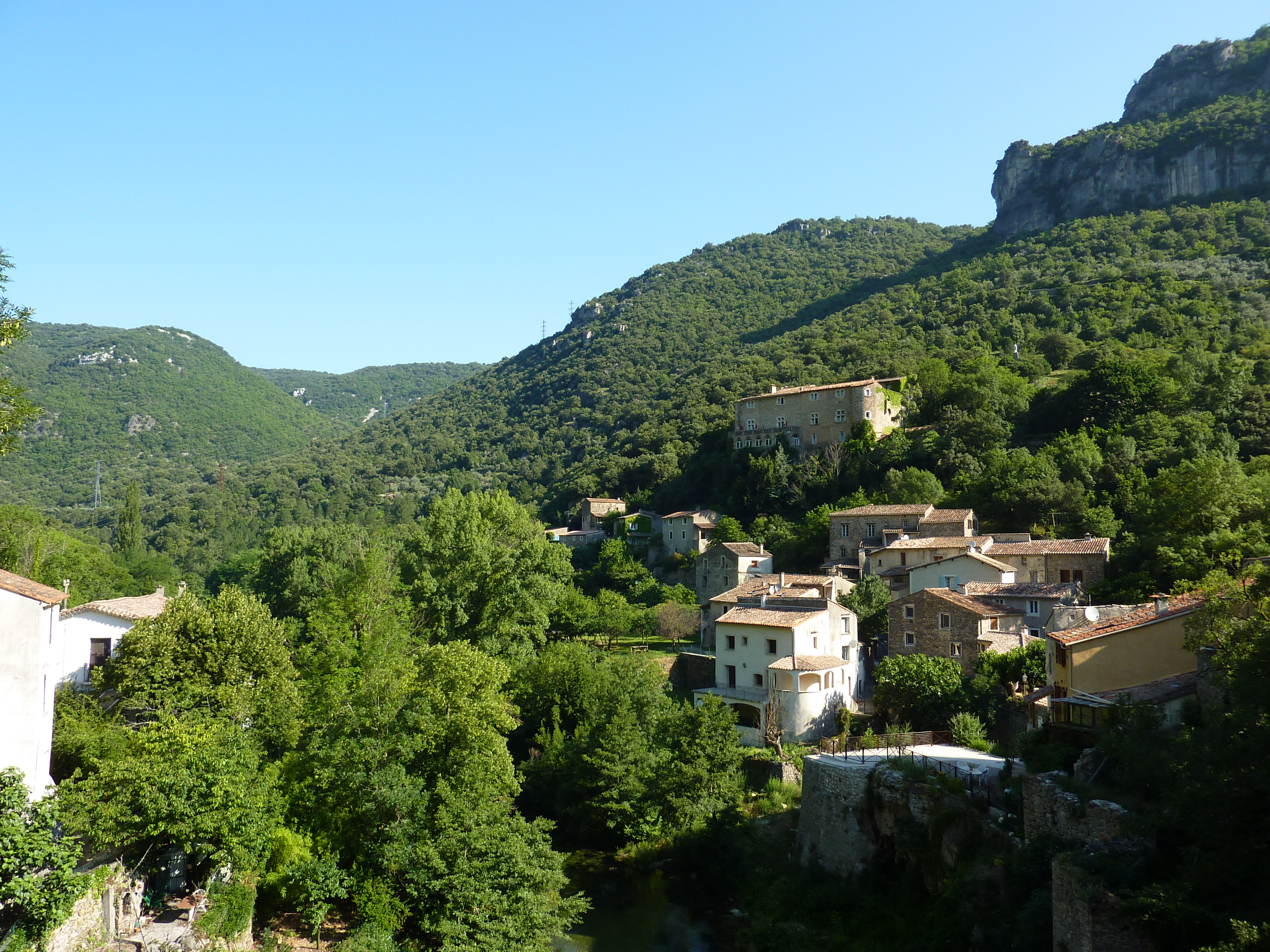 Gorges de la Vis: le village de Gorniès